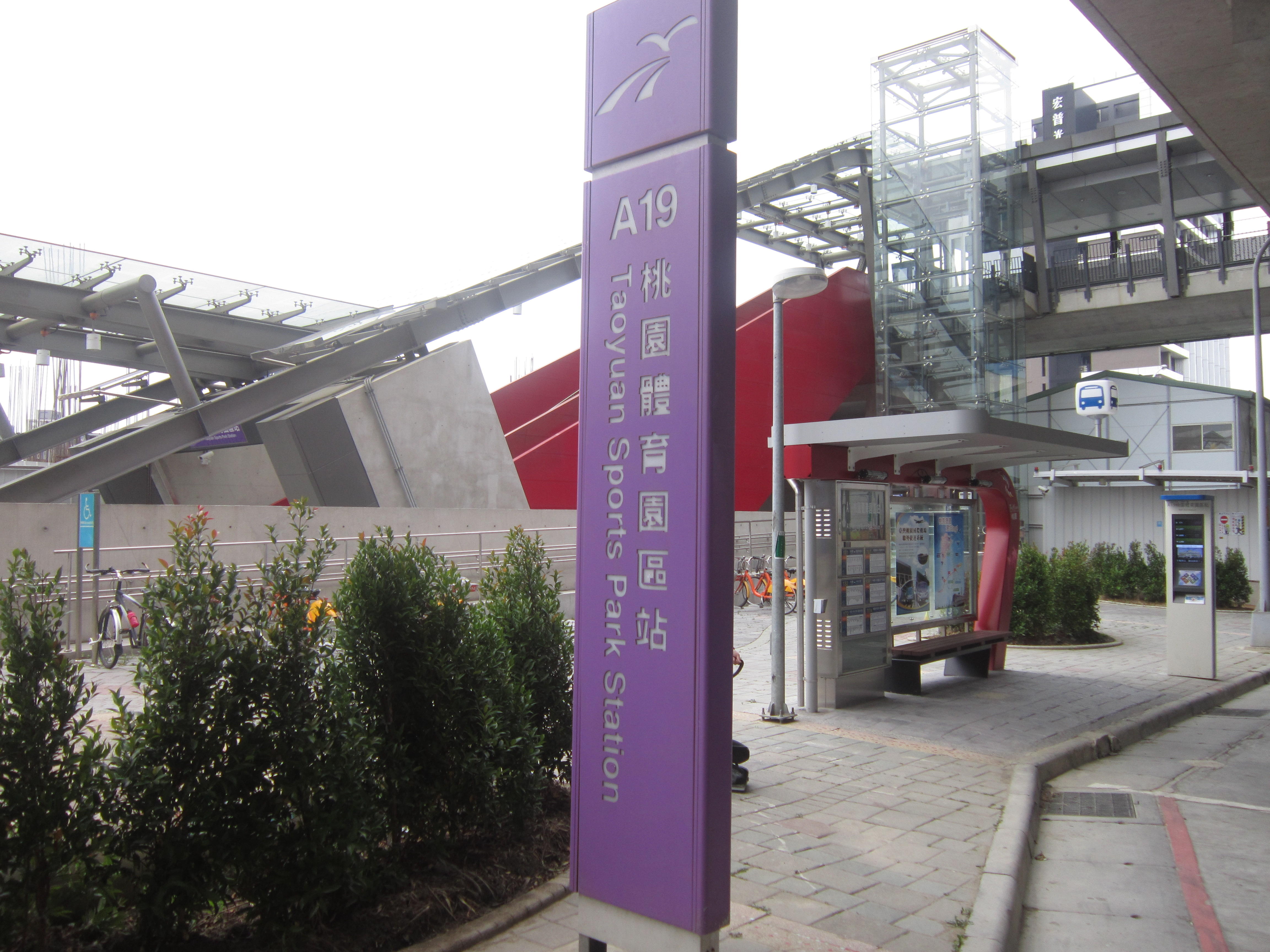 桃園體育園區站出入口站名板（中）、桃園體育園區站出入口（左）、桃園市公車「桃園體育園區站」候車亭（右）。